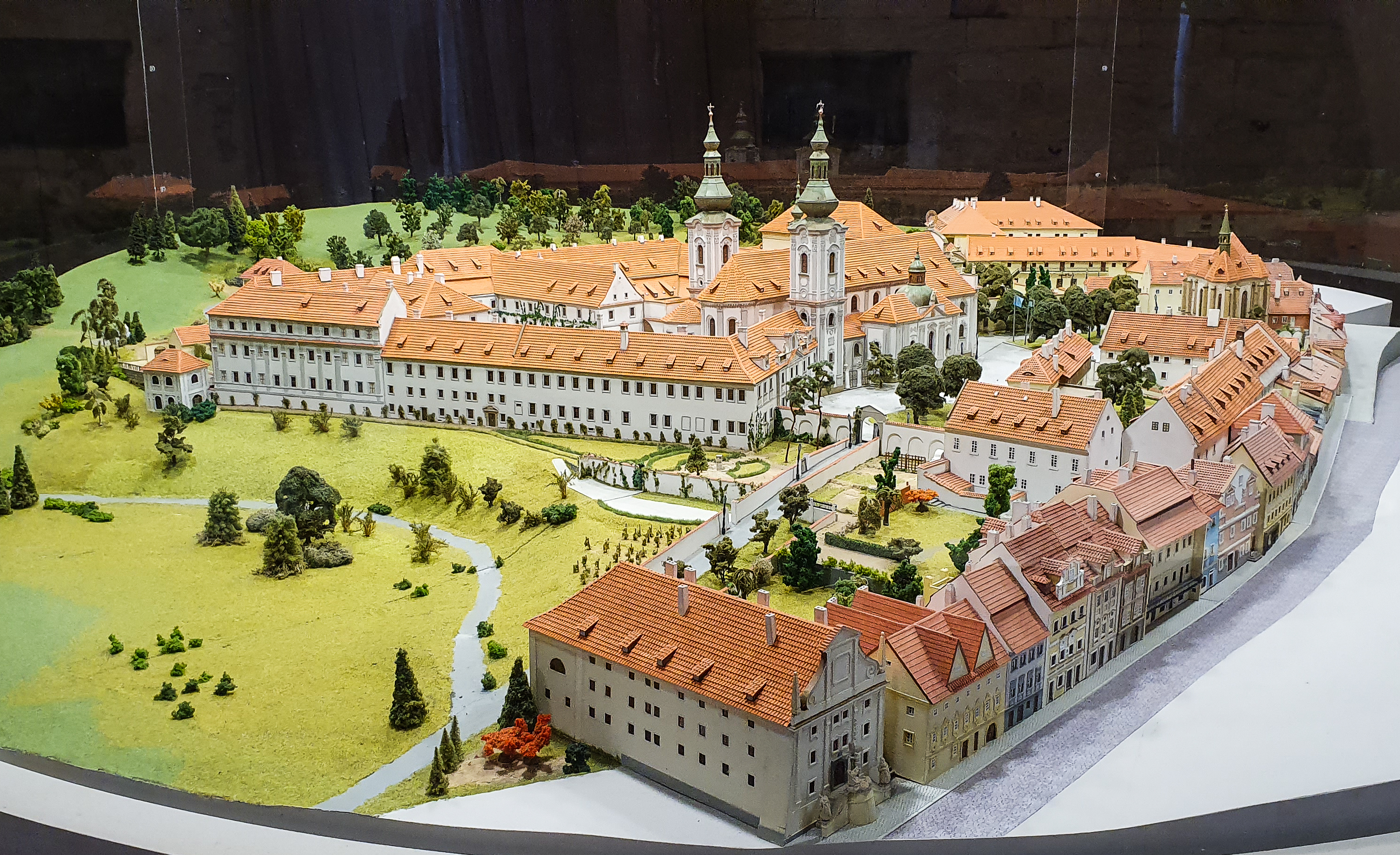 Tijdens mijn reis met mijn Tsjechische vriendin, wilde ze graag weer de bibliotheek zien die ze vaak in 1964 bezocht. Het gebouw was vervallen geraakt tijdens de bezetting, maar tot haar verbazing was het na 50 jaar weer helemaal opgeknapt en hersteld. Nu is overigens vrijwel alles toegankelijk.